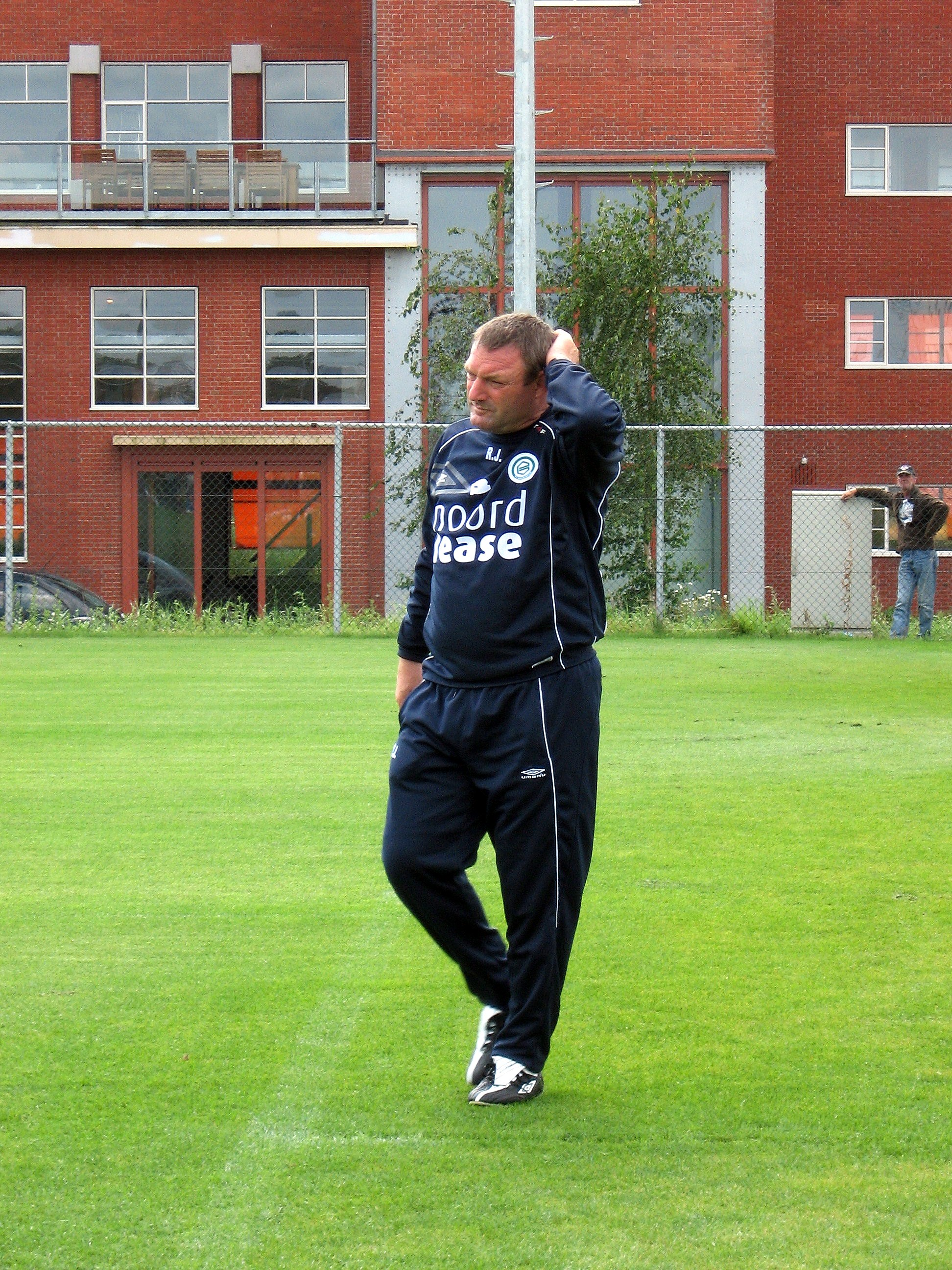 FC Groningen-trainer Ron Jans